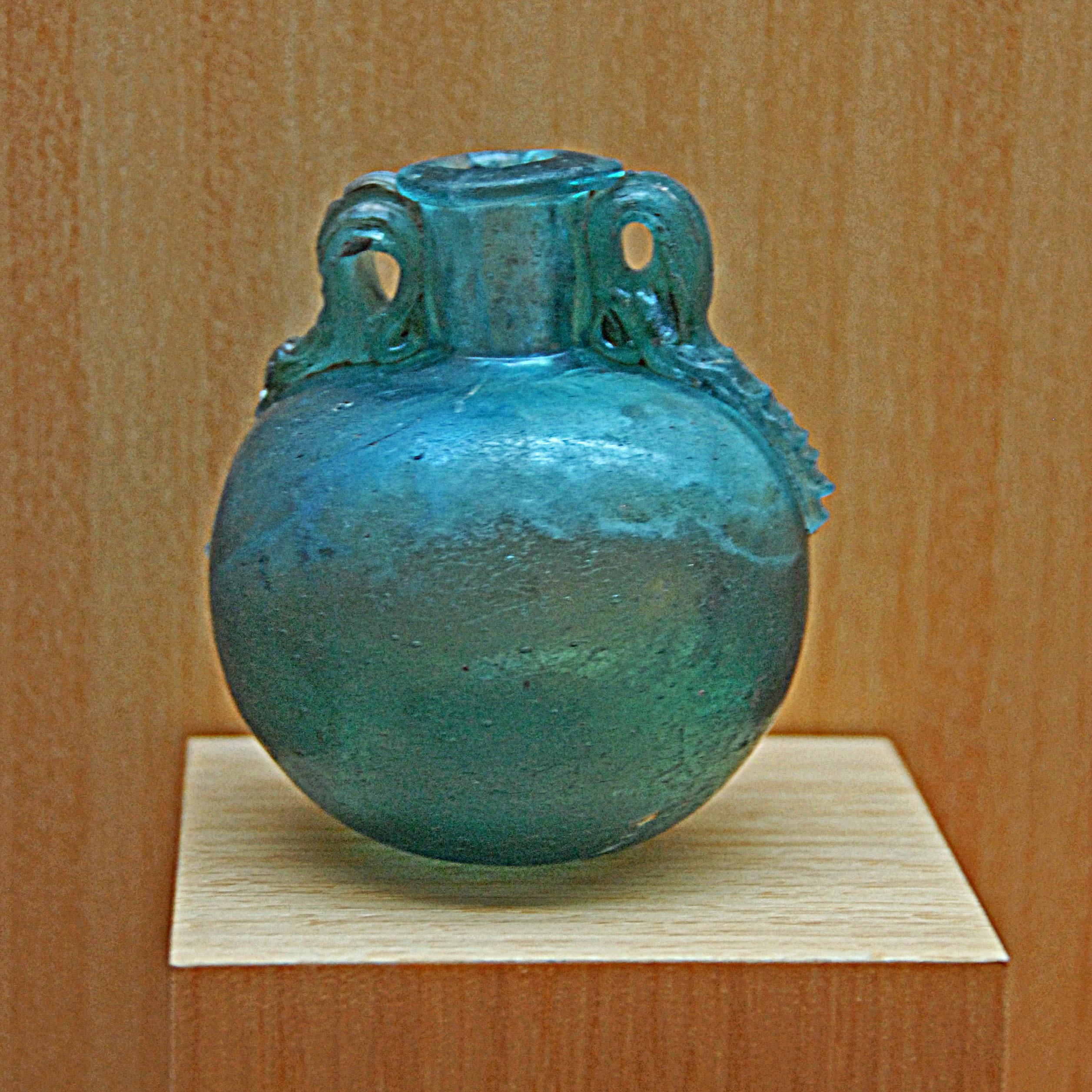 Civaux, Museum, gallorömischer Glaskrug